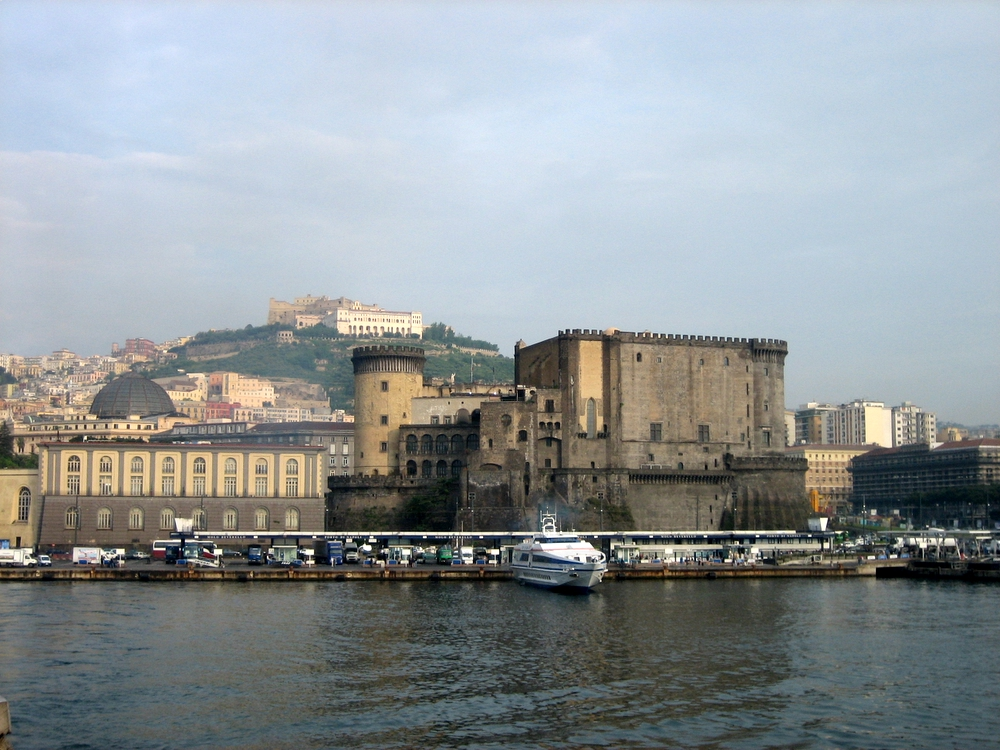 Napoli, Italia: Porto, Castel Nuovo e, in alto, Castel Sant'Elmo.IMG_0451